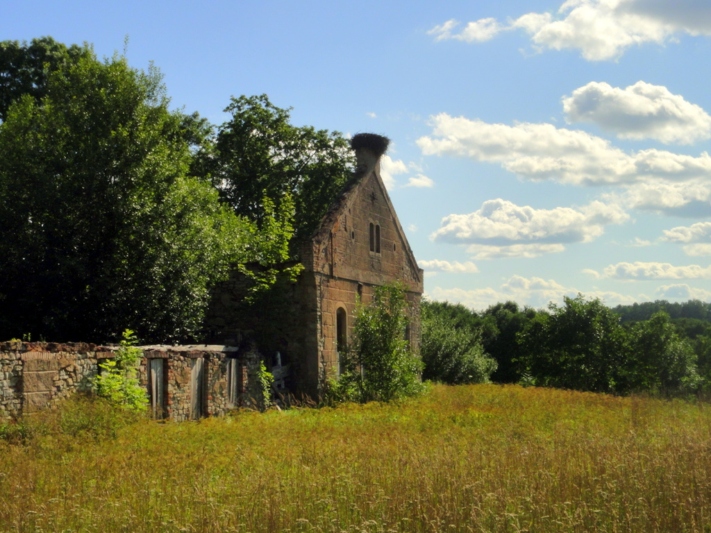 Old barn ruins, Brinkpedvale, (Brinken- Pedwalen)